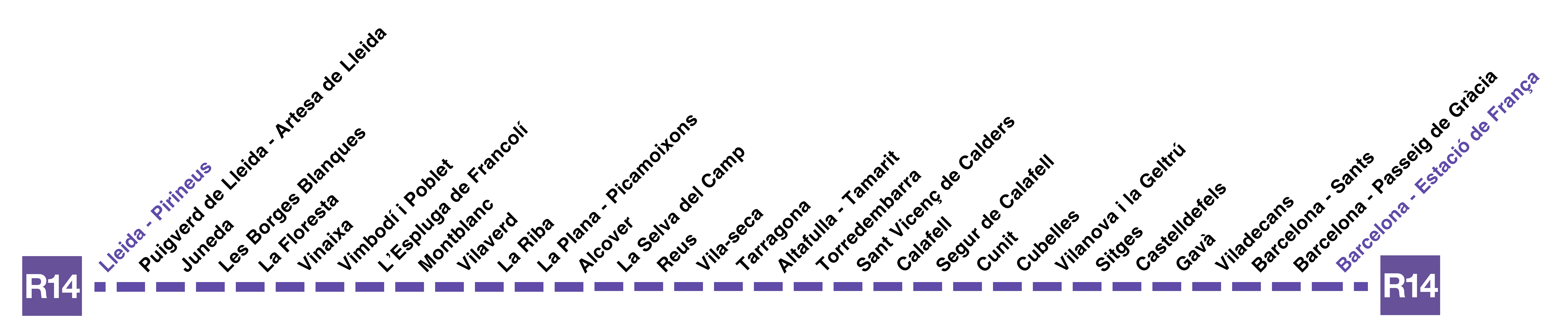 Mapa de la línea R14 de Rodalies de Catalunya